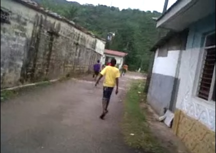 Seitenstraße in Porus, Jamaica